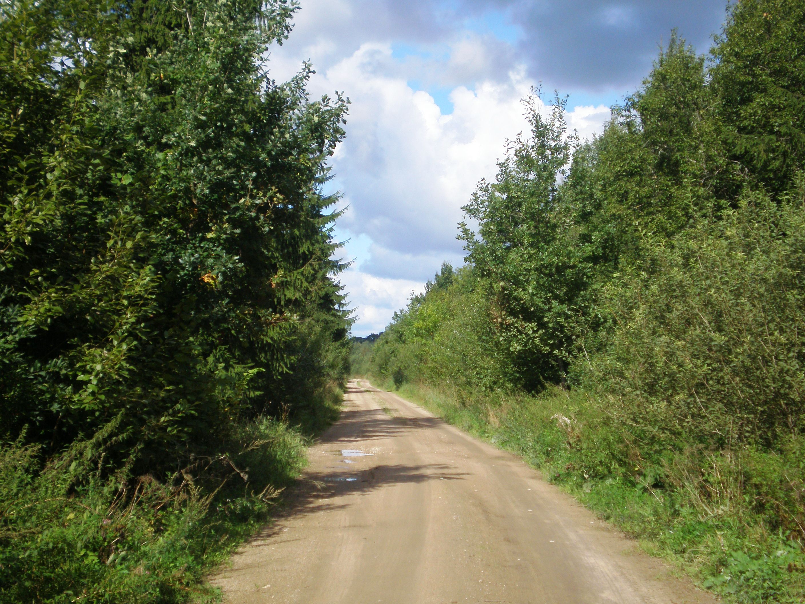 Pašušvio miškas ties Zembiškiu, Kėdainių raj.